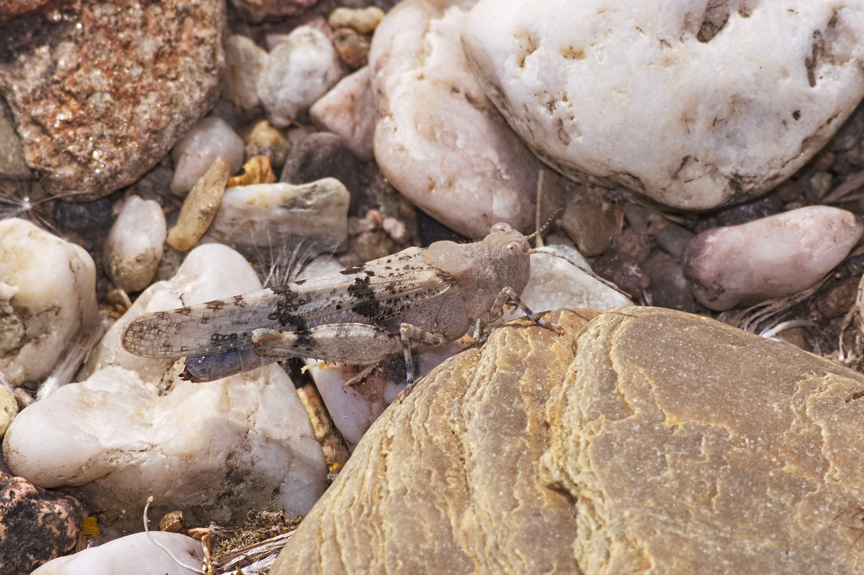 Blauflügelige Sandschrecke - Sphingonotus caerulans. Aufgenommen an der Mulde in Eilenburg, Sachsen, Deutschland.